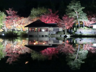 昭和記念公園の「秋の夜散歩」でライトアップされる日本庭園